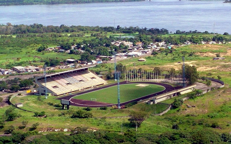 Foto Aérea del Antiguo Polideportivo Cachamay